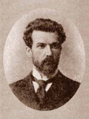 Красуский, Константин Адамович